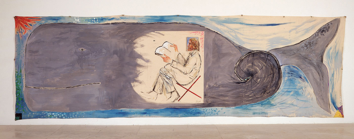 לוייתן (1983), אקריליק עד בד ועל בד רפוי, 644x260 ס״מ, אוסף מוזיאון ישראל, ירושלים